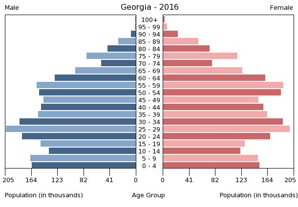 A population pyramid illustrates the age and sex structure of a country's population and may provide insights about political and social stability, as well as economic development. The population is distributed along the horizontal axis, with males shown on the left and females on the right. The male and female populations are broken down into 5-year age groups represented as horizontal bars along the vertical axis, with the youngest age groups at the bottom and the oldest at the top. The shape of the population pyramid gradually evolves over time based on fertility, mortality, and international migration trends.